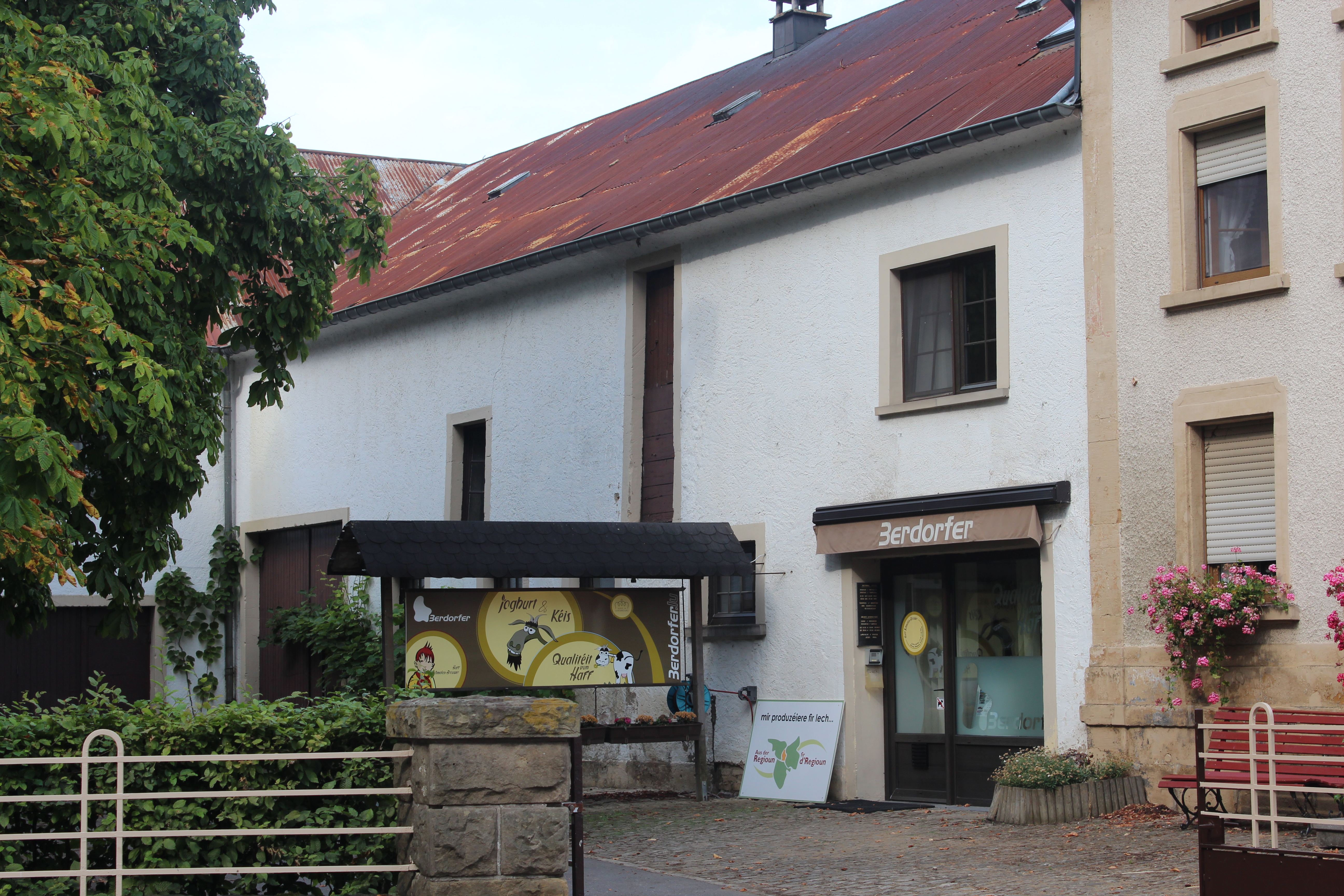 Haff Schmalen-Brouwer, Produktiouns- a Verkafsplaz vu Berdorfer Kéis